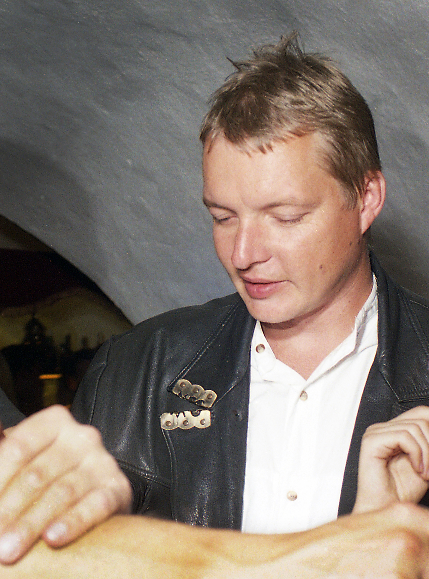 Peeter Jalakas, teatrijuht, lavastaja, teatriuuendaja 96